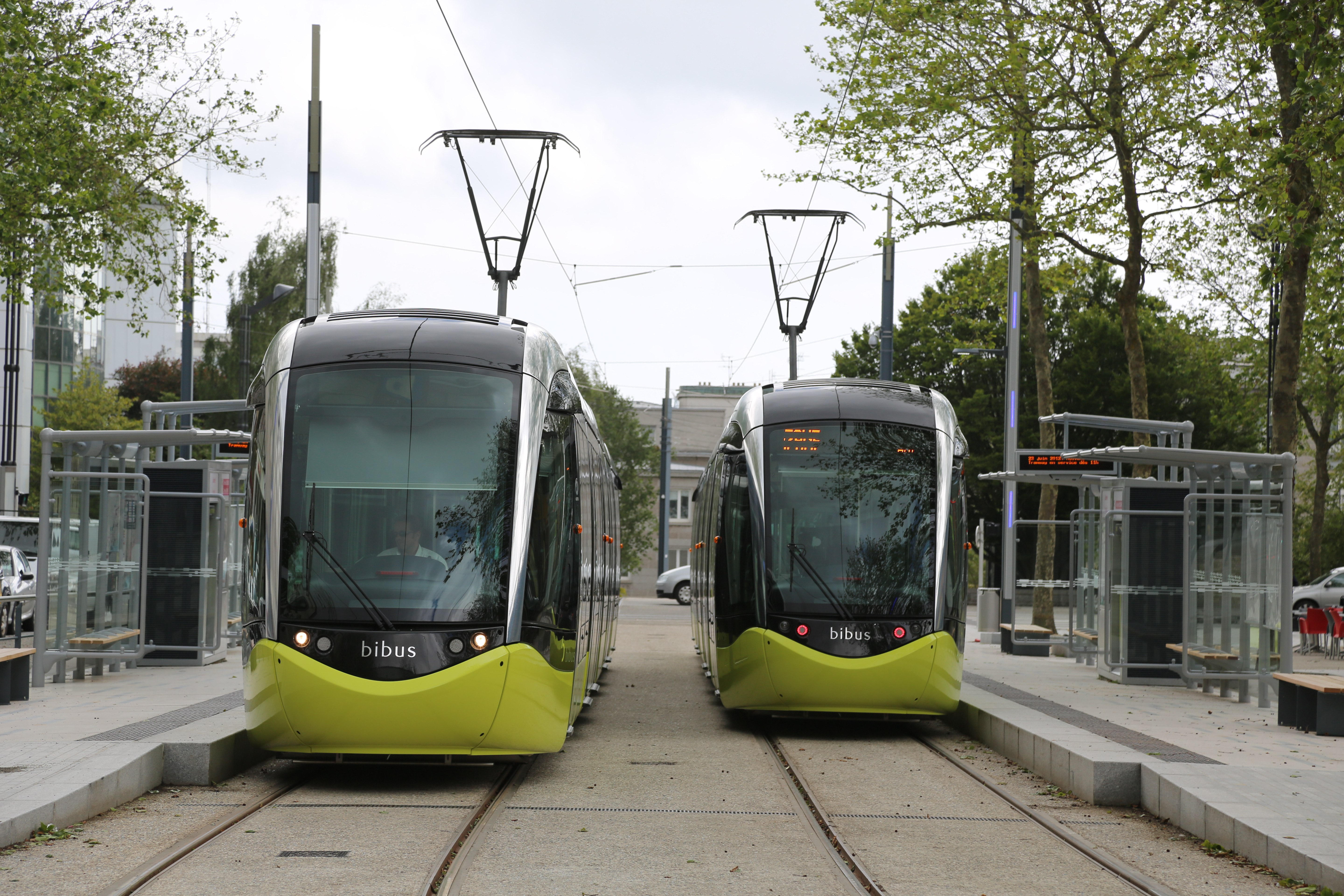 Photos autour de l'inauguration du Tramway à Brest le 23 juin 2012